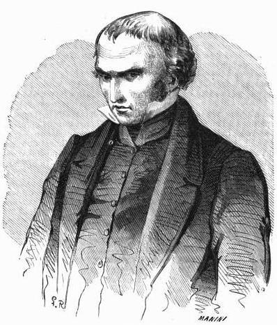 Louvel